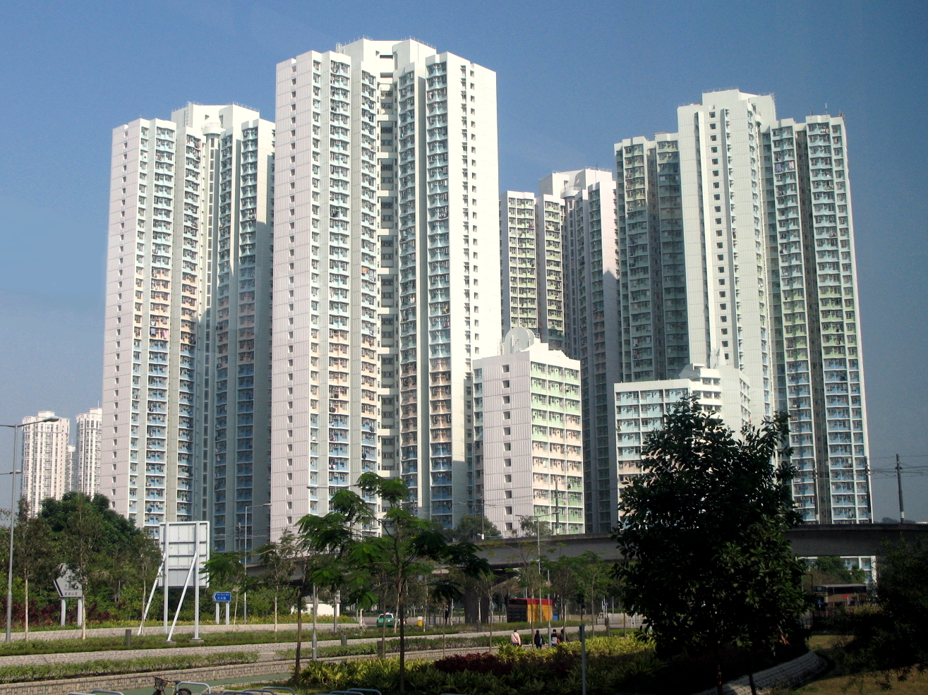 HK Tin Tsz Estate in Tin Shui Wai